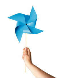 Un nouveau souffle pour tous